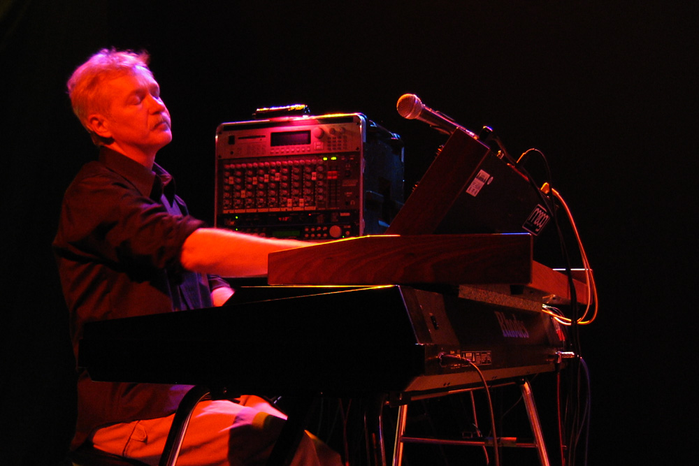 Kraan live am 27.10.2003, Ingo Bischof